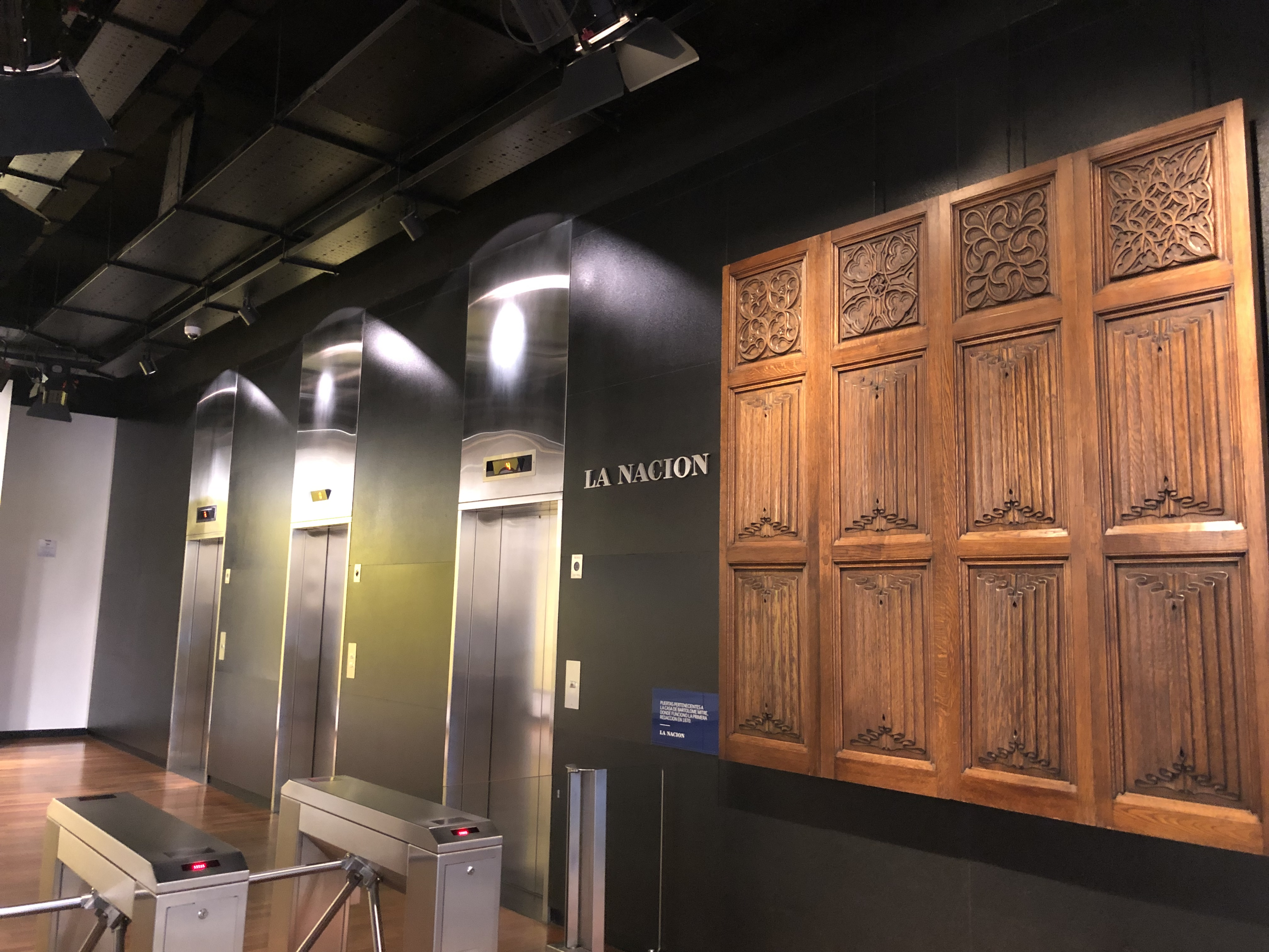 Ingreso a las oficinas del Diario La Nacion